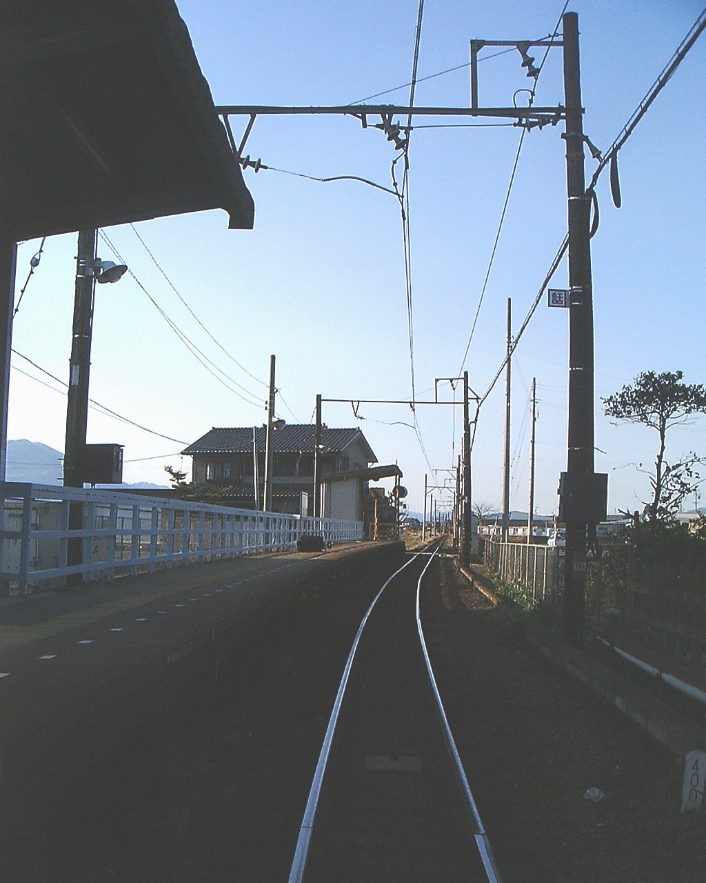 近鉄北勢線長宮駅（三岐鉄道へ譲渡の後廃駅） ホーム